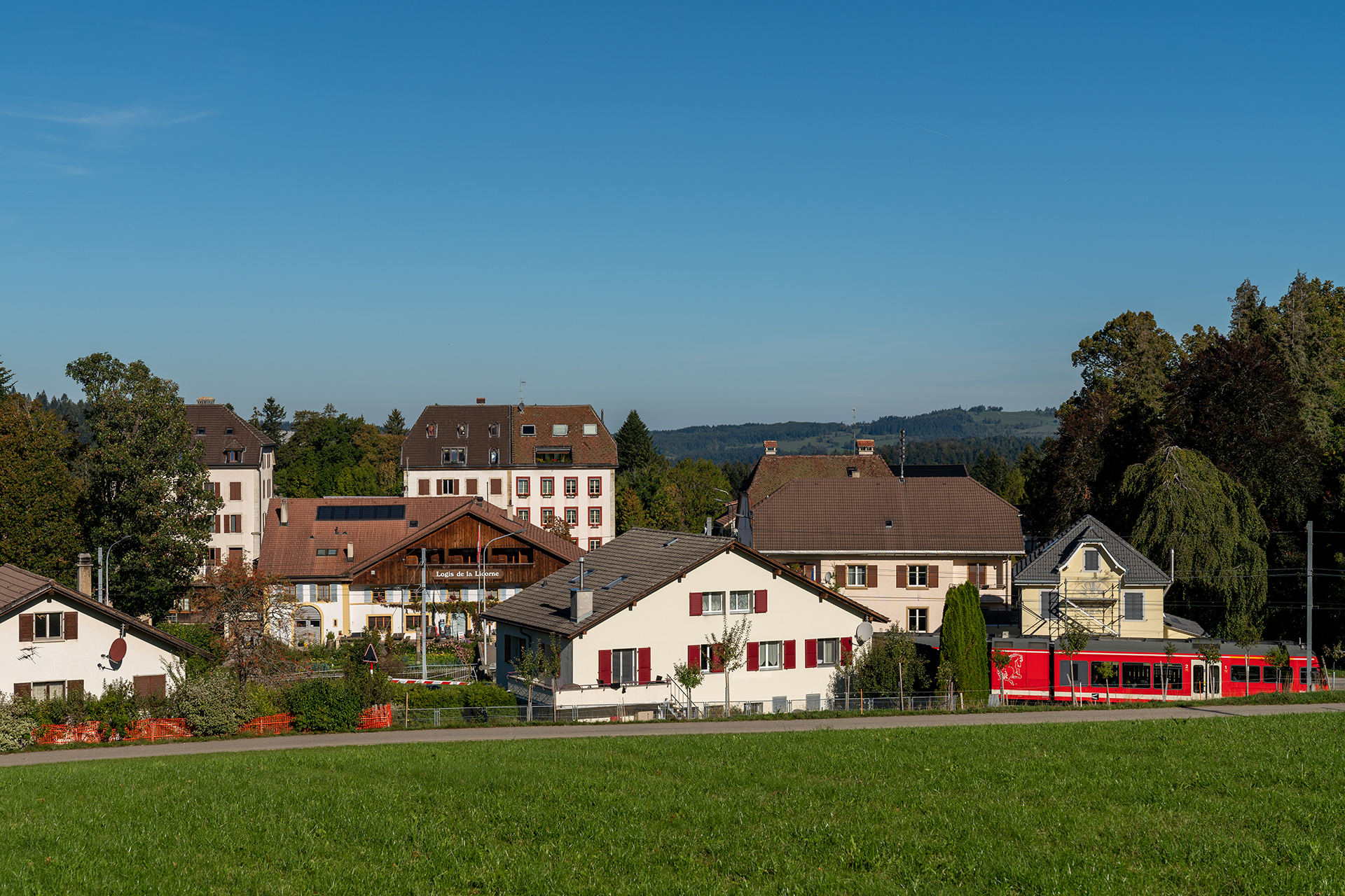 Blick aufs Dorfzentrum von La Ferrière (BE)